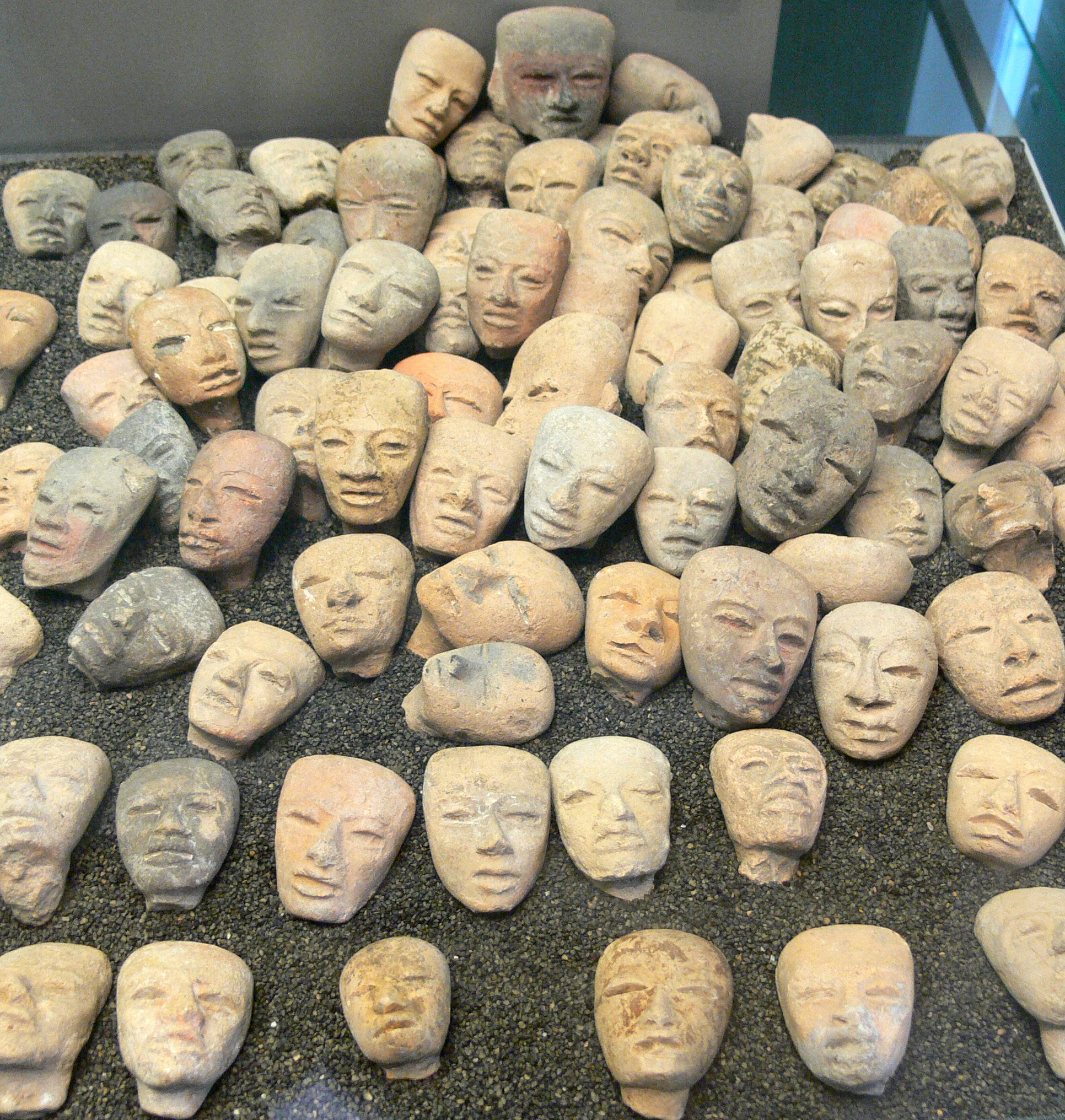 Schaffhausen, Museum zu Allerheiligen, Sammlung Ebnöther, (Abteilung "Idole") Köpfe, Mexiko, zentrales Hochland, Teotihuacán, 100–600 n .Chr.